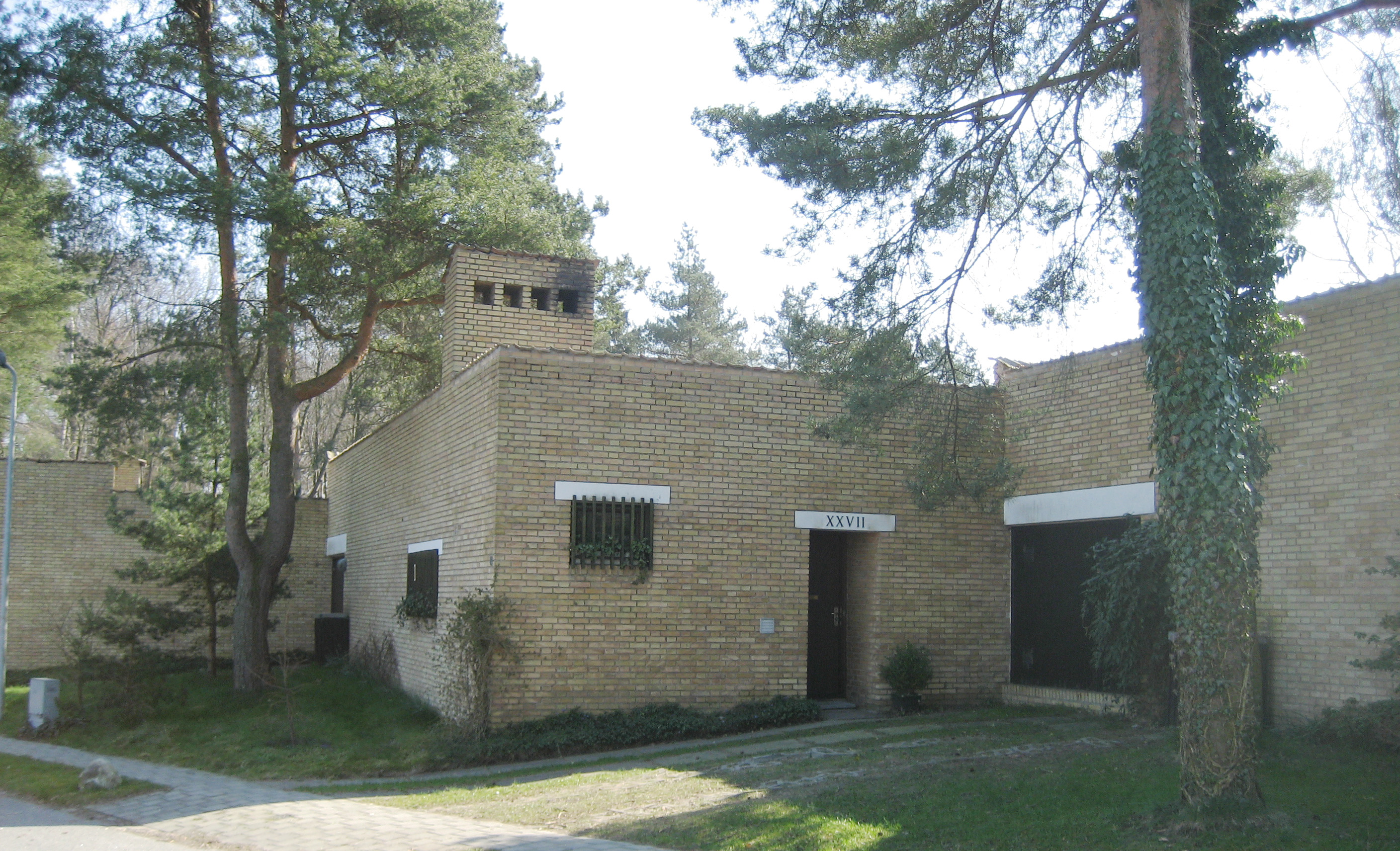 Romerhusene, Helsingør